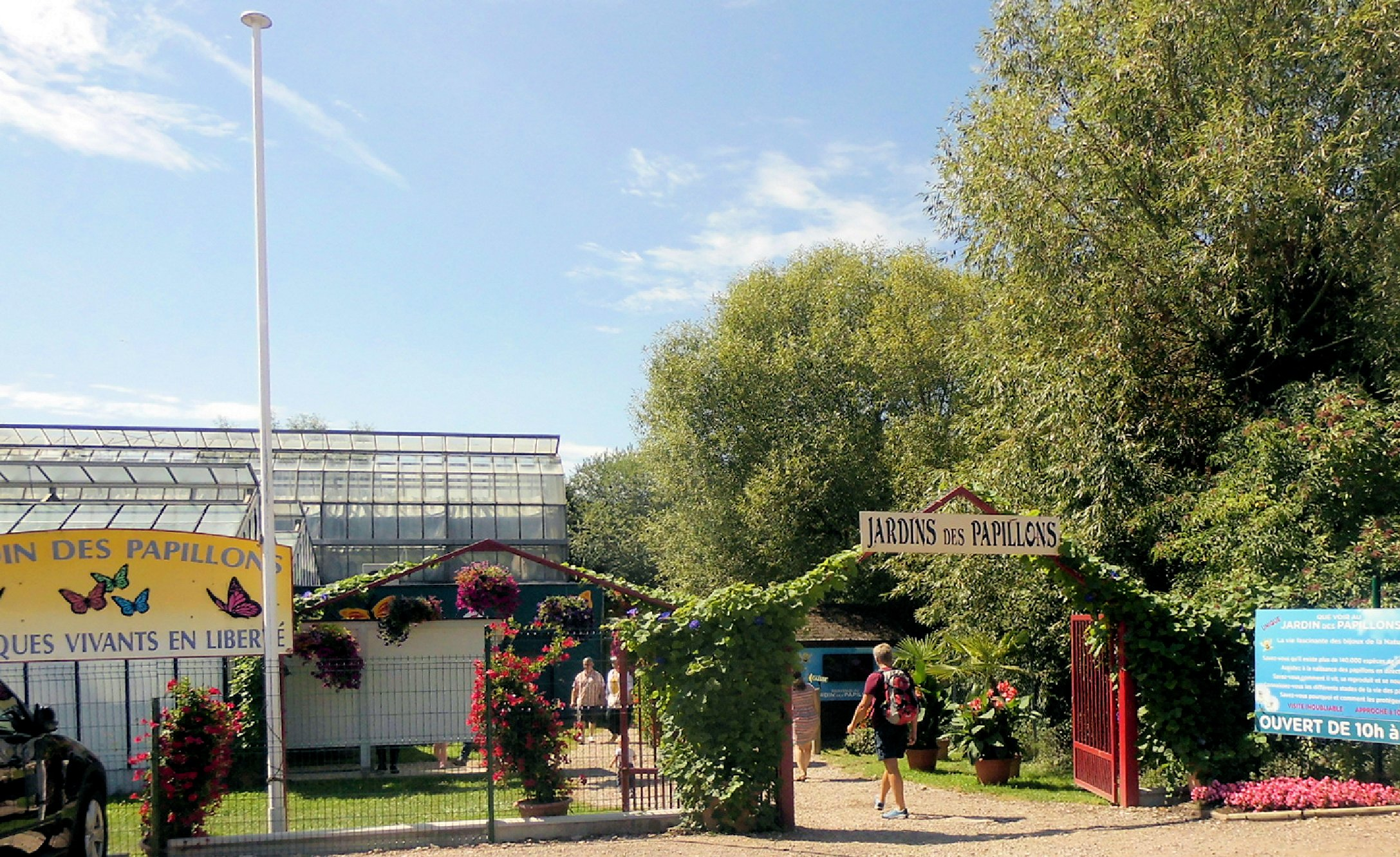 Entrée du parc des papillons à Hunawihr